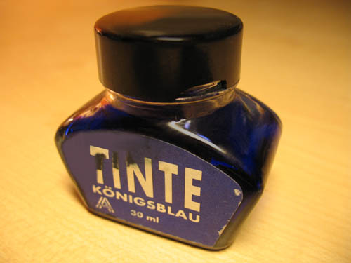 ein Tintenfass selbst fotografiert